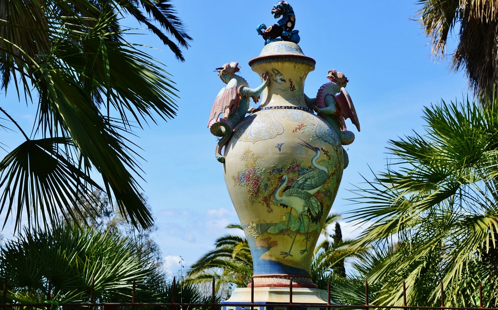 Parc Samà (Cambrils)